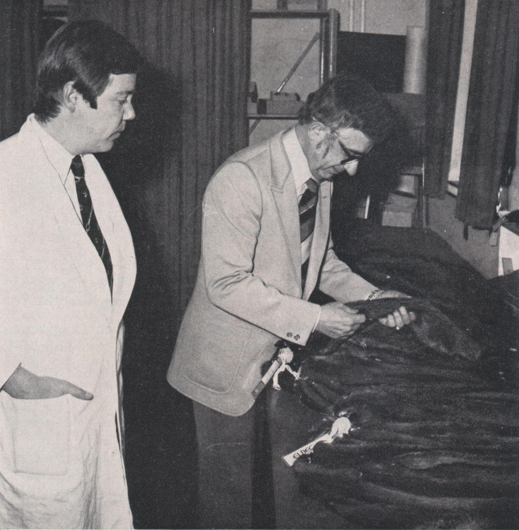 Thomas Lenhart (Fa. Rosenberg & Lenhart) und Kürschnermeister E[h]rgang* (langjähriger Werkstattleiter der Firma Rosenberg & Lenhart in Frankfurt am Main, vorher eigene Kürschnerei in Baden-Württemberg*) begutachten die neuen Nerzfelle „Sa Belle“ aus den USA. In Amerika war es einer kleinen Züchtergruppe gelungen, einen neuen Nerztyp zu züchten. Die Züchtung basiert auf dem „breeding stock“ (Zuchtstamm) der langhaarigeren, zobelähnlichen Kojah-Nerze, die eine Zeitlang von sich reden machten. Der neue Typ wurde als wesentlich verbessert bezeichnet, bestechend durch eine flauschige Unterwolle und mit weniger Grannenhaar. Zu der Zeit gab es Sa Belle hauptsächlich in den Farben Standard und Demi Buff. Der neue Nerz wurde bei der Einführung durch die Firma Liebergall, New York und in Europa durch Rosenberg & Lenhart exklusiv vermarktet und zur Frankfurter Pelzmesse 1975 vorgestellt. * Wahrscheinlich Ehrgang, Pelz-Ehrgang, Bad Urach. Herr Ehrgang ist einige Jahre vor 2013 in Frankfurt am Main verstorben.